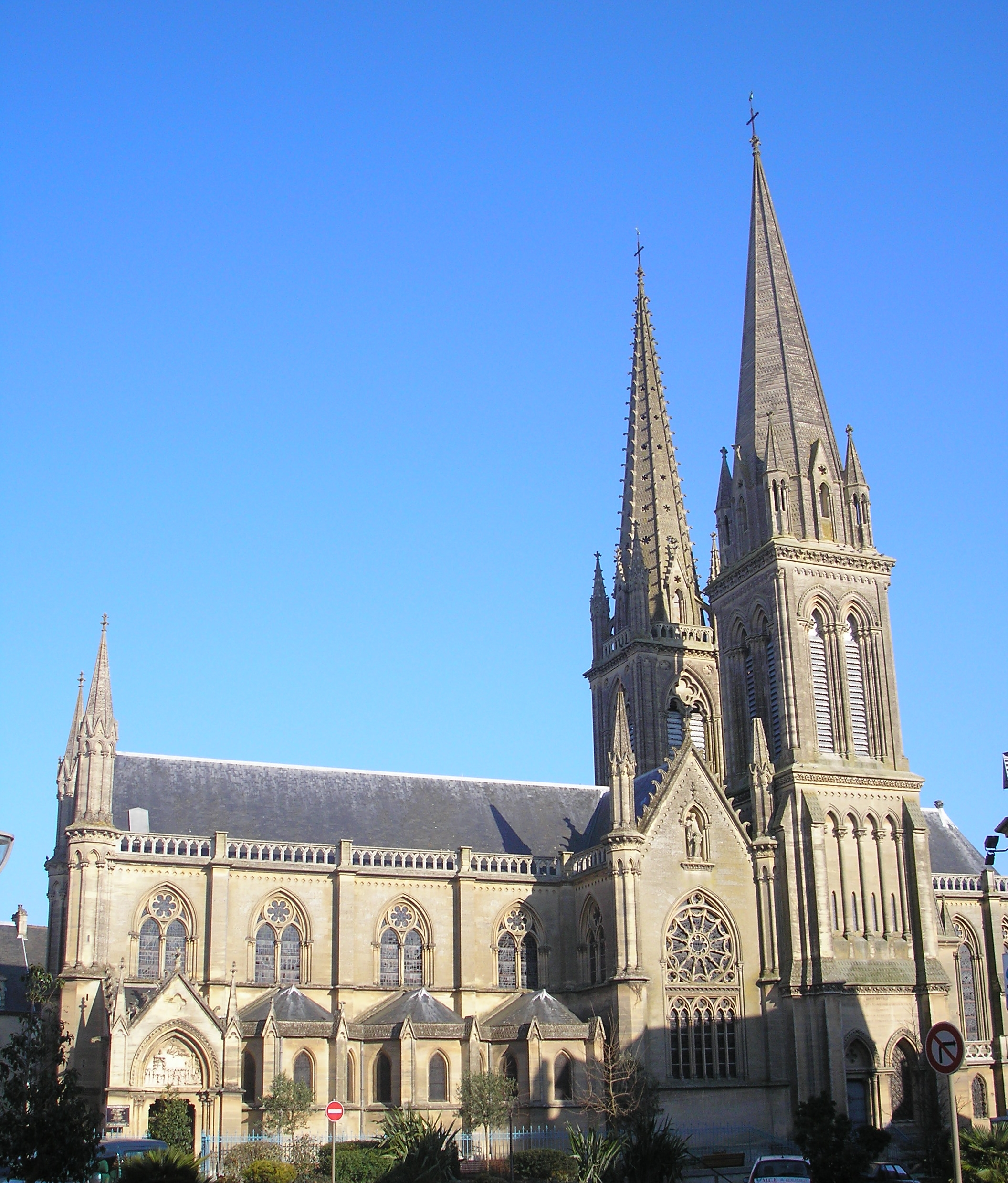 Douvres-la-Délivrande (Normandie, France). La basilique Notre-Dame-de-la-Délivrande.